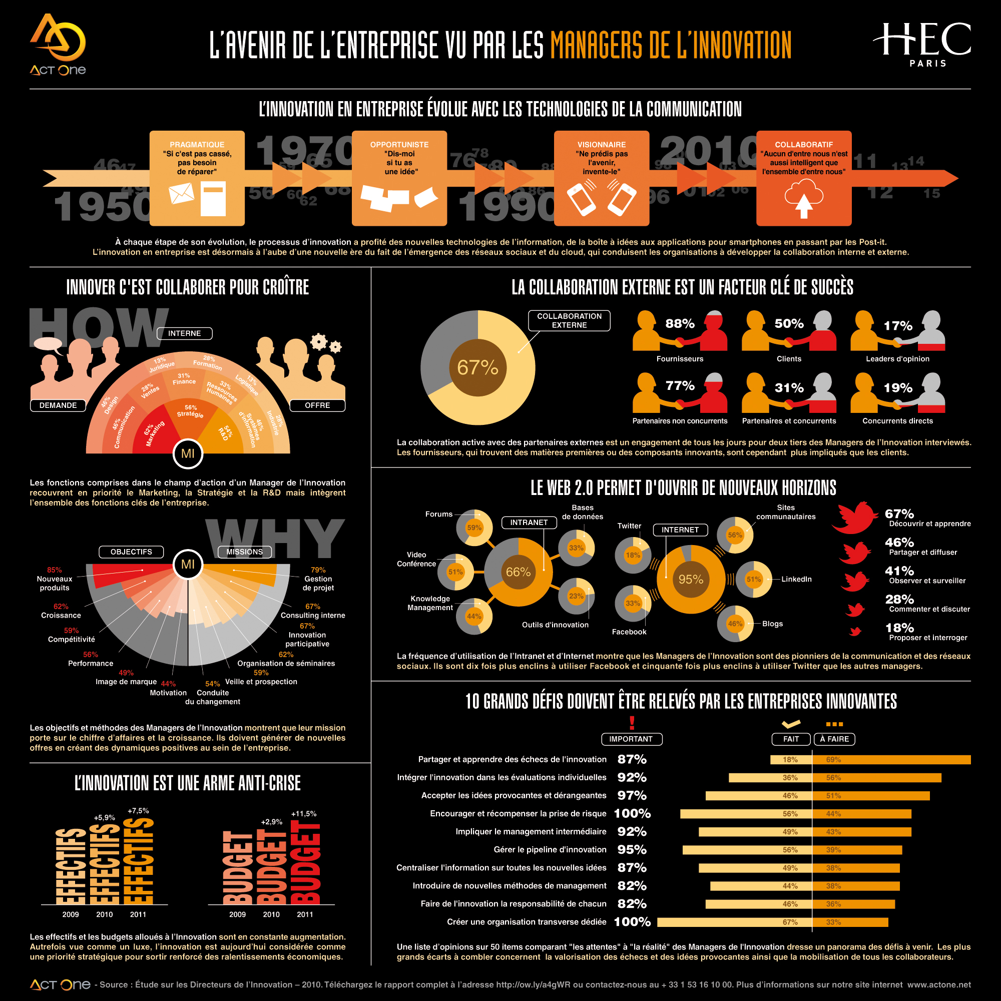 Etude HEC Act One